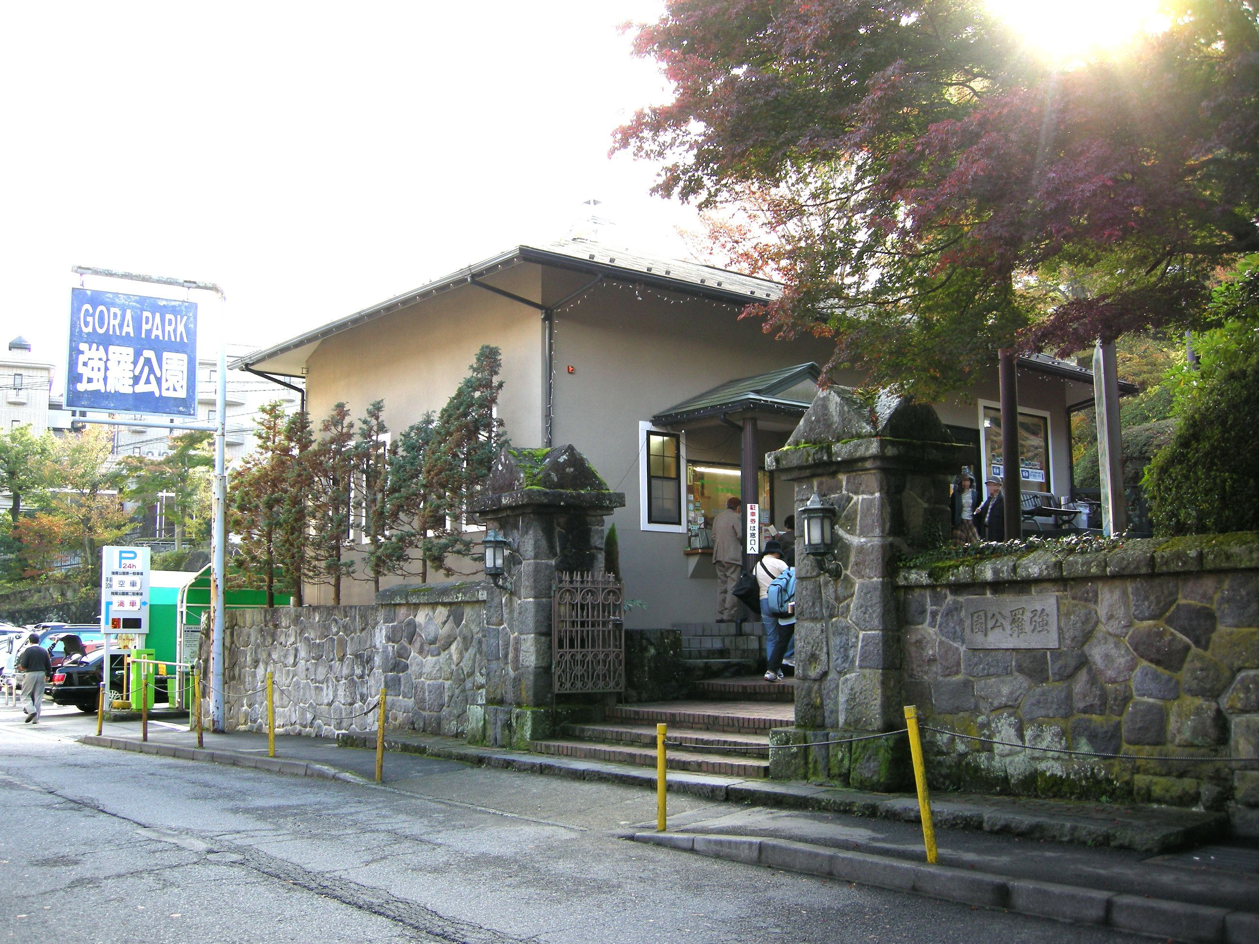 Hakone gora park